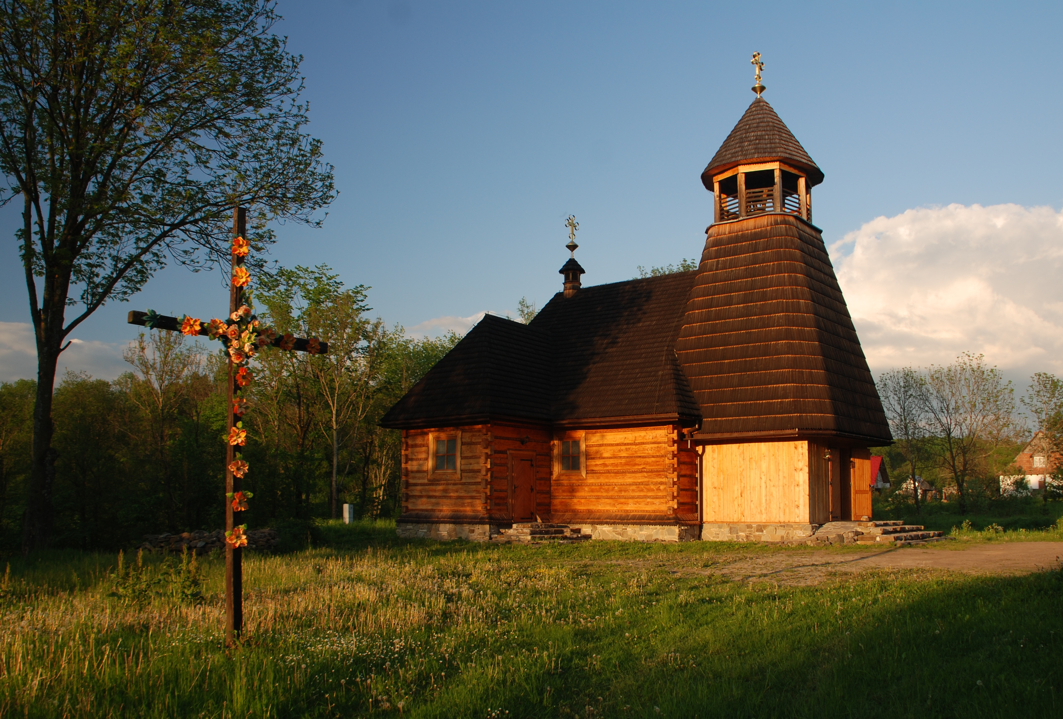 Wola Michowa